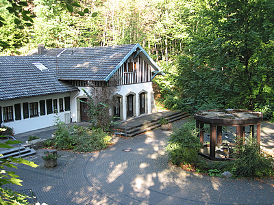 Gebäude des "Kaiser-Heinrich-Bades" in Warstein-Belecke. Das Brunnenhaus wurde über dem 1963 erbohrten neuen Brunnen errichtet.